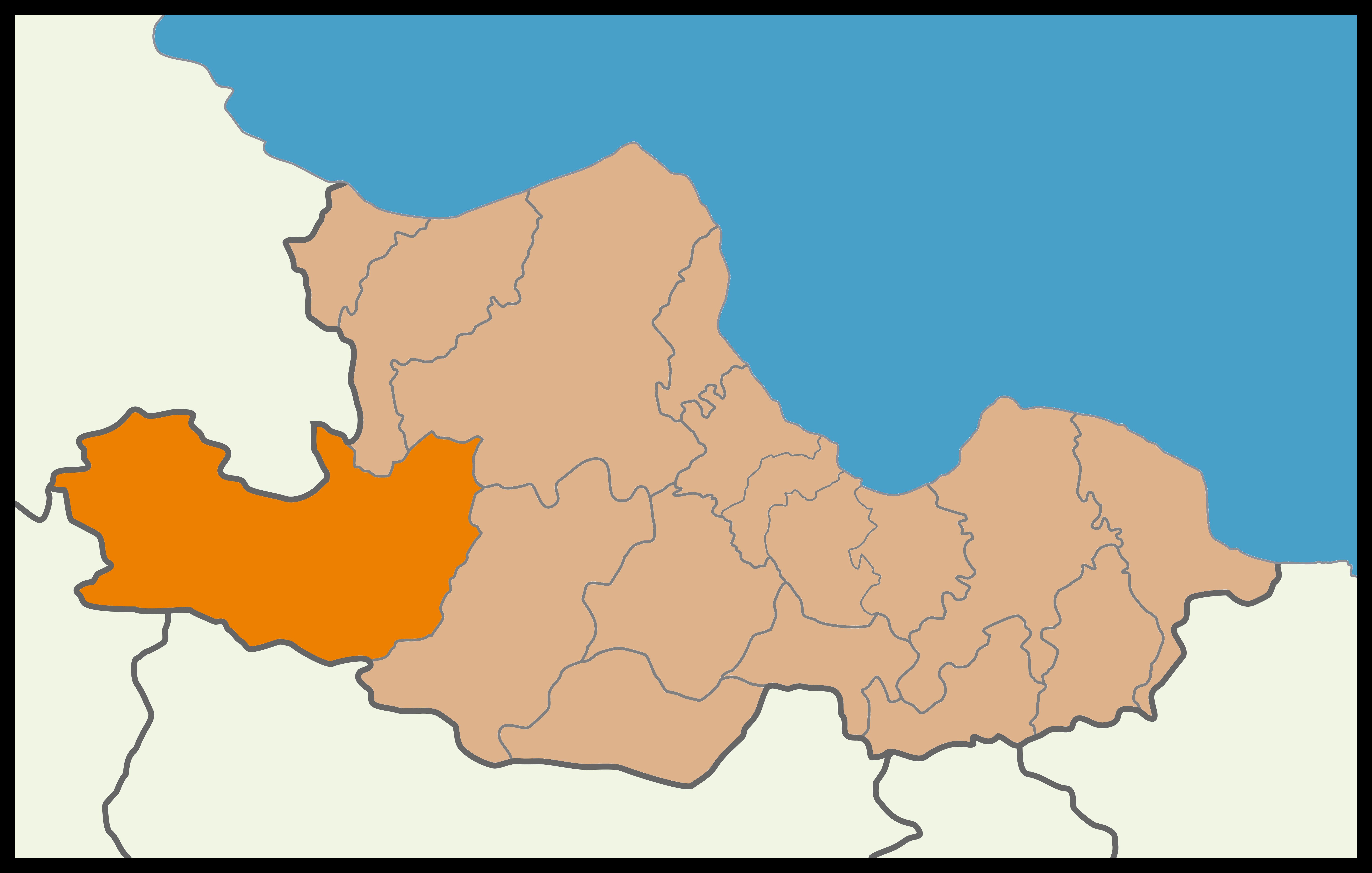 Samsun'un Vezirköprü ilçesinin 2014 Türkiye yerel seçimleri haritası.